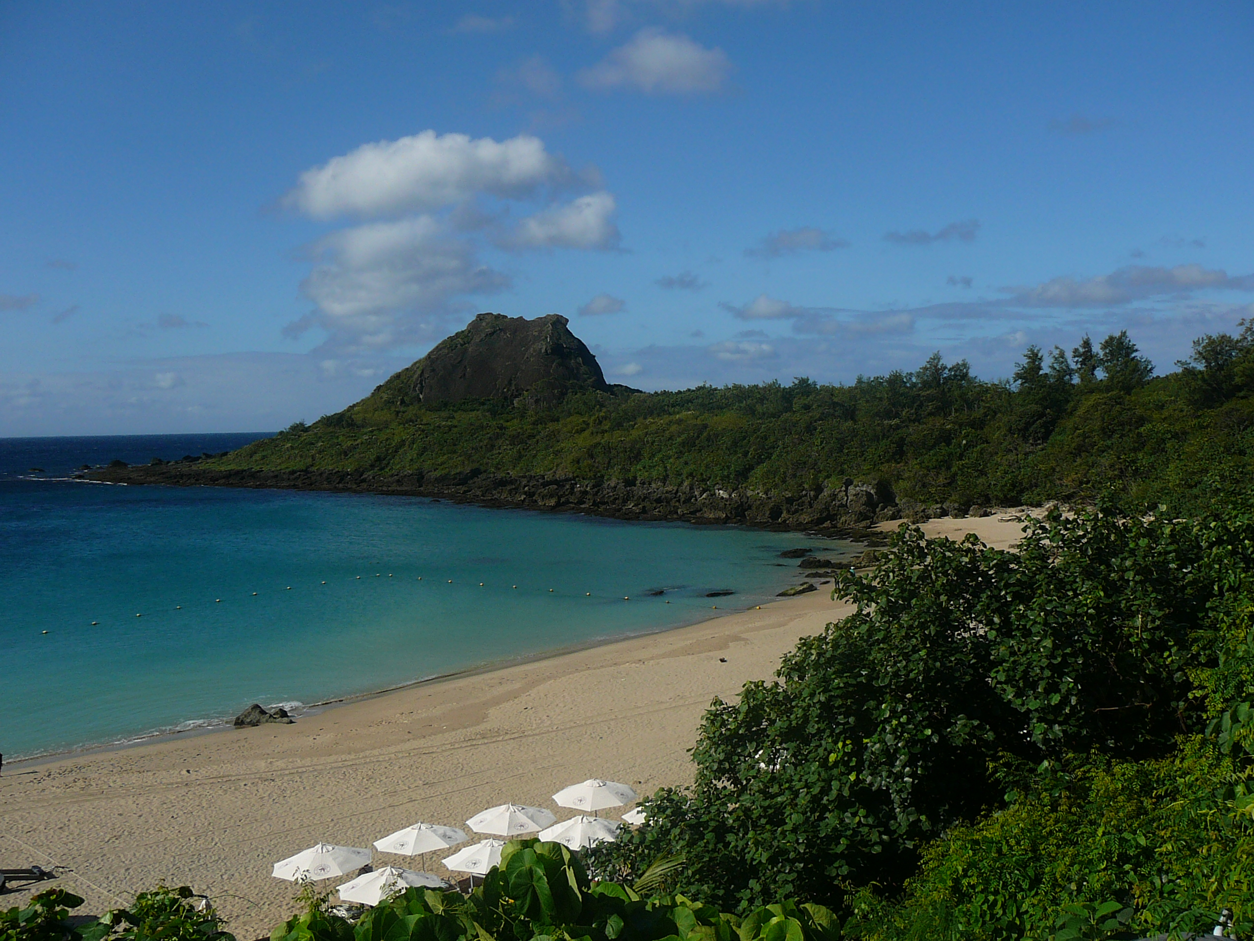 墾丁國家公園的青蛙石